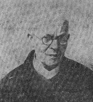 Josef Pejška (1870 - 1946), Český redemptorista a profesor kanonického práva.